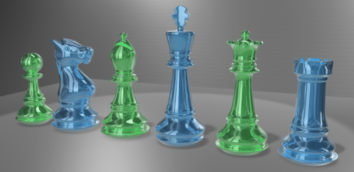 Piezas de cristal de colores. Estos vivos matices contrastan con la sobriedad de los tonos clásicos, blanco y negro. Staunton Chess Set rendered with Blender, by Igor Križanovskij, 2005